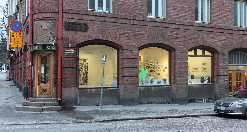 Galleria G on Suomen taidegraafikot ry:n ylläpitämä suomalaista taidegrafiikkaa esittelevä taidegalleria Helsingissä (vuonna 2016: Pieni Roobertinkatu 10, 00120 Helsinki). Samoissa tiloissa pääsee tutustumaan suomalaisten taidegraafikkojen myyntikokoelmaan (Grafoteekki).